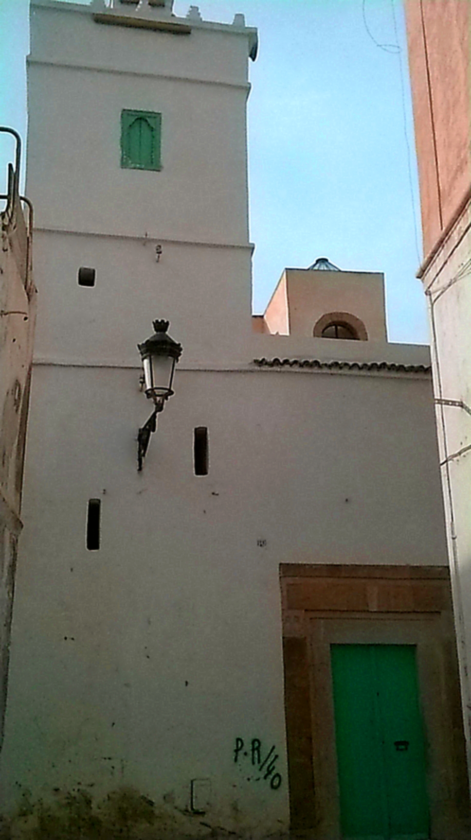 La médina de Tunis مدينة تونس العتيقة